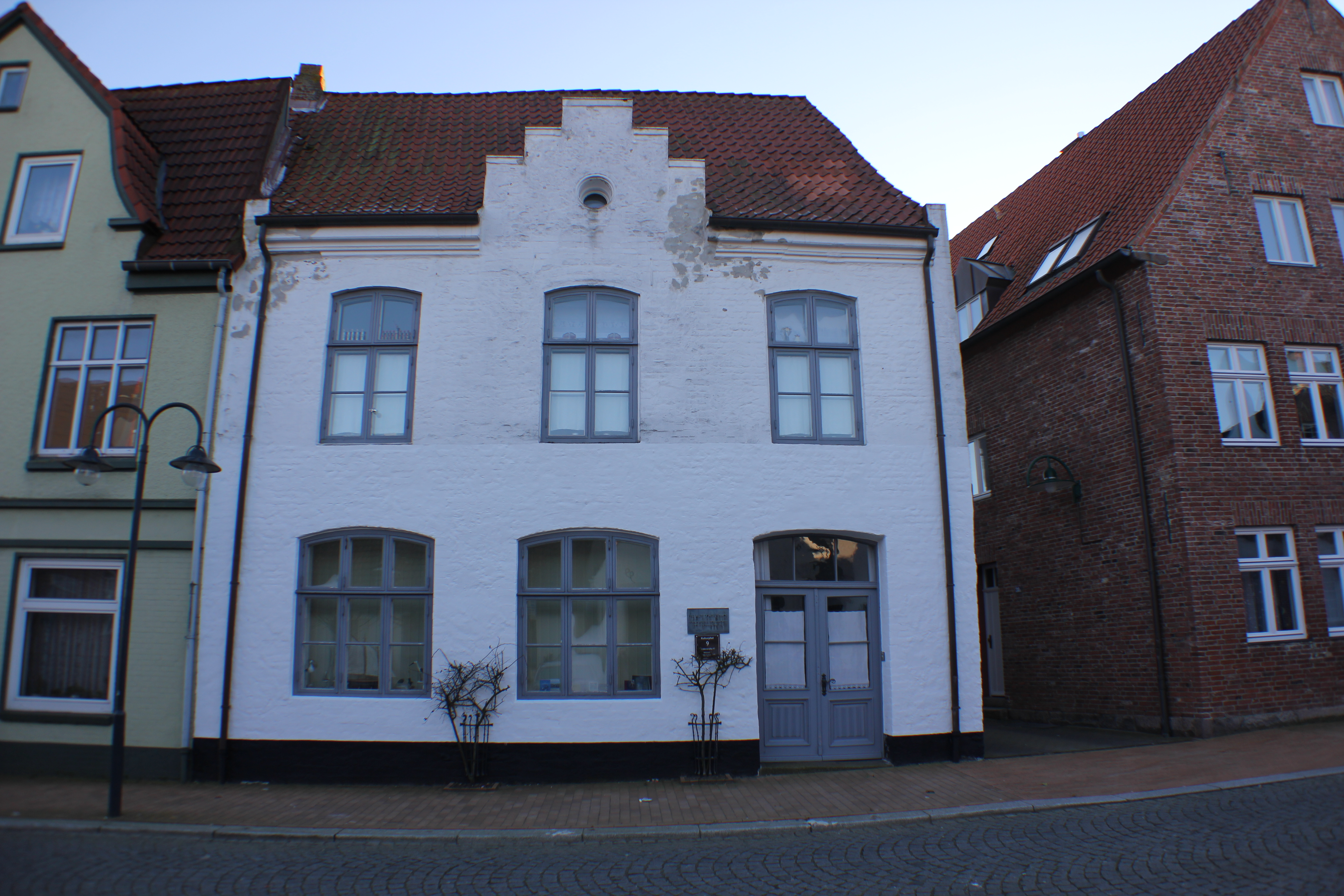 Der Alte Schützenhof (Schauplatz der Stormnovelle Pole Poppenspäler); Süderstraße 42 in Husum (2012); (Kluturpfad 9)